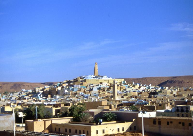 View over Ghardaïa